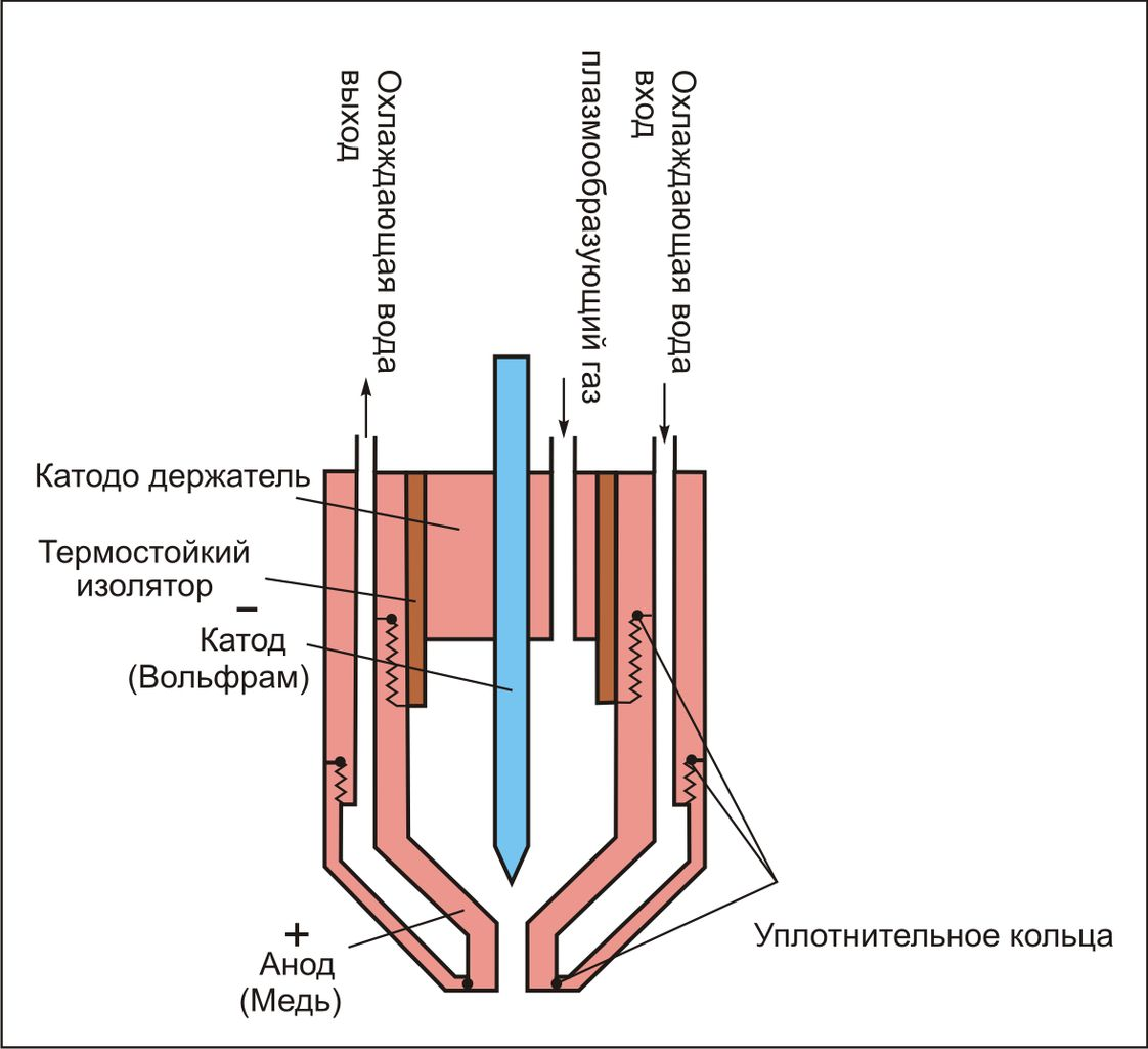 Плазмотрон, генератор плазмы